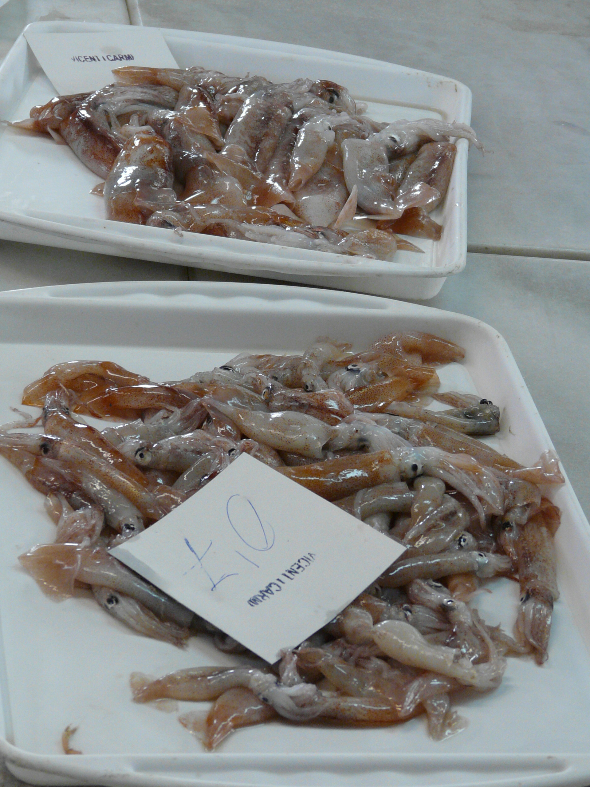 Pasamar preparado para subasta al público en El Campello (Alicante). Denominación que se utiliza en la Comunidad Valenciana también para la pota o el volador.